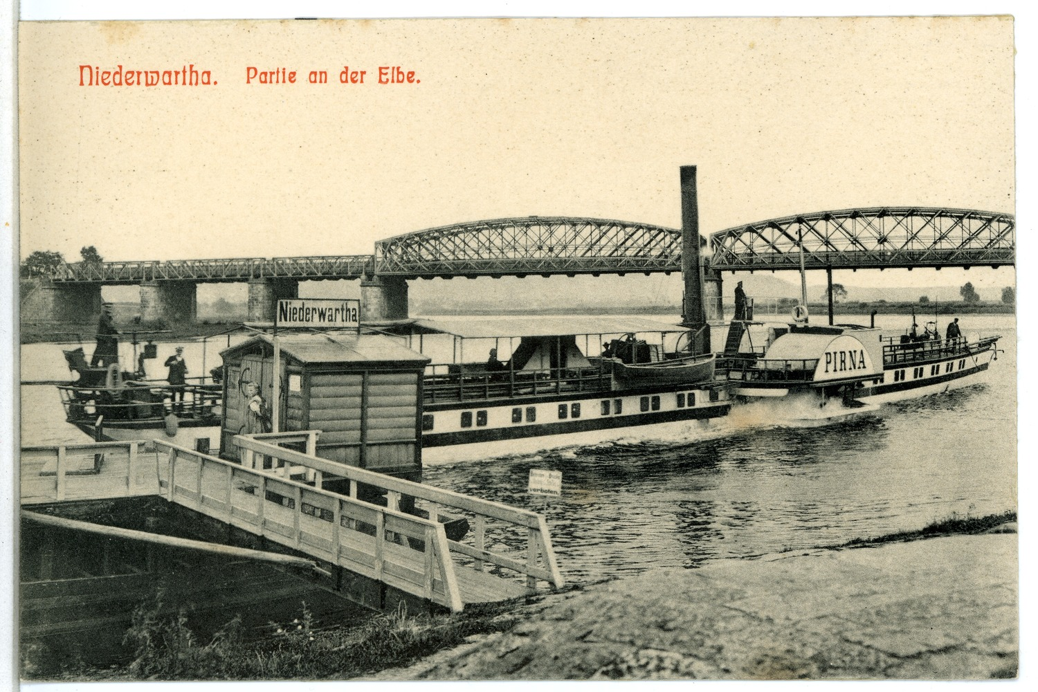 Niederwartha; Elbebrücke mit Dampfer Pirna, Dampferanlegestelle This postcard is from publisher Brück & Sohn in Meißen ( postcard has a unique number 07053 and is available in a higher resolution at the publisher. This images was uploaded in a cooperation project between Wikipedians and the publisher.